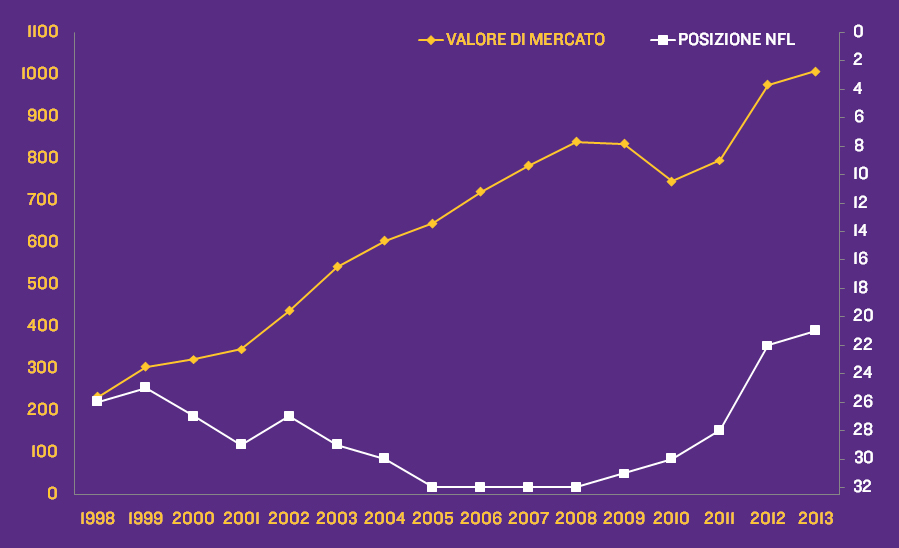 Grafico illustrante l'andamento nel corso degli anni del valore di mercato dei Minnesota Vikings